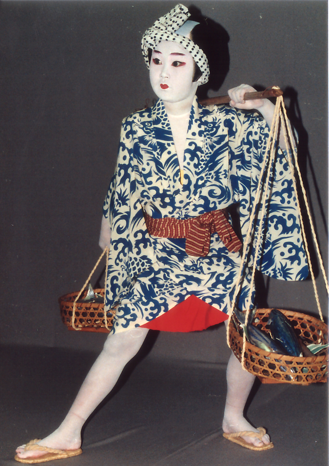 かつお売り(歌舞伎舞踊、常磐津) Katsuo-uri((dance of)fish seller(kabuki dance))